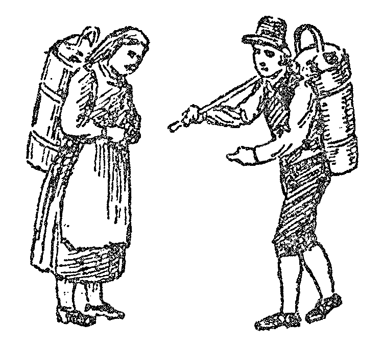 Ameisler und Ameislerin